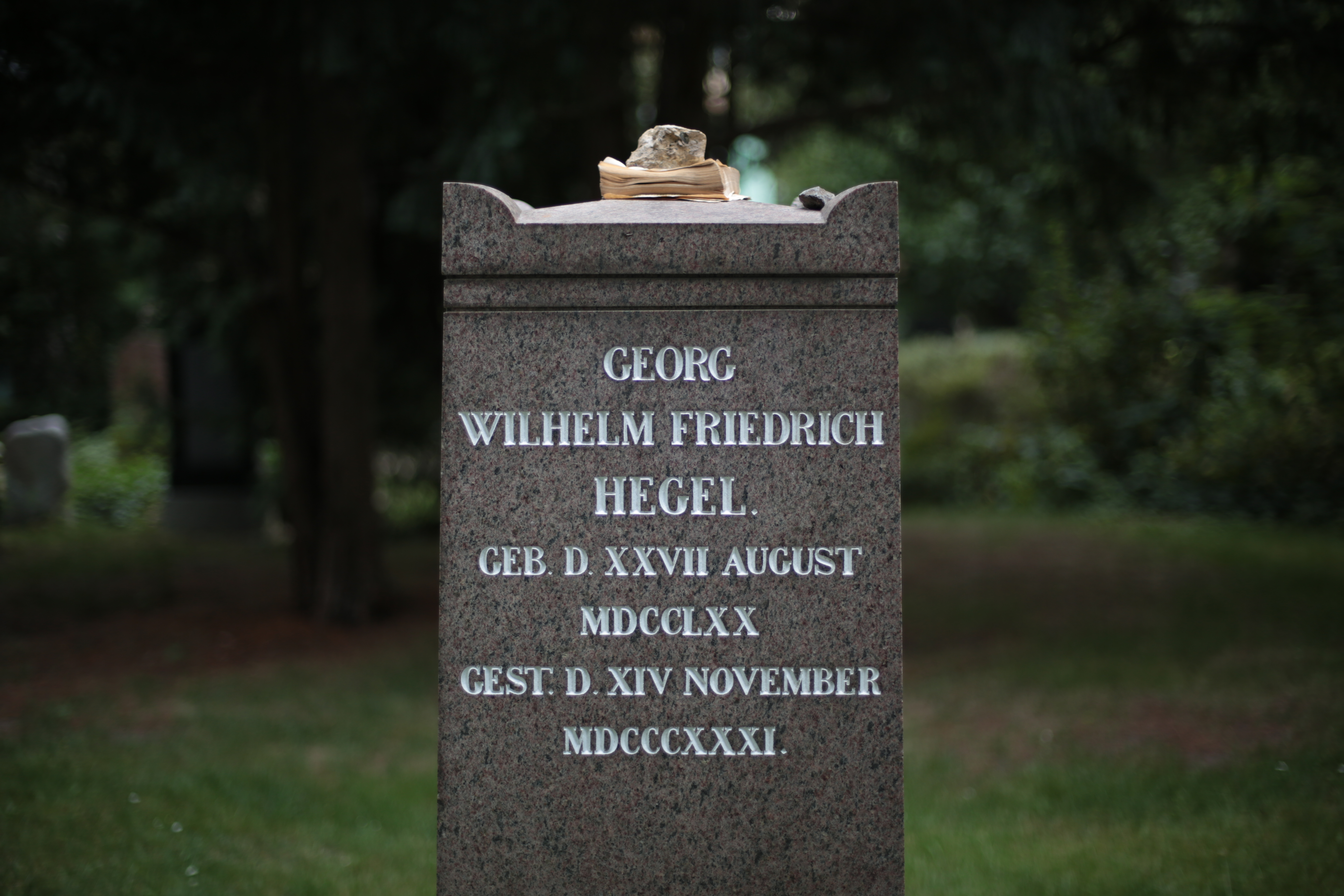 La tomba di Hegel al Dorotheenstädtischer Friedhof di Berlino